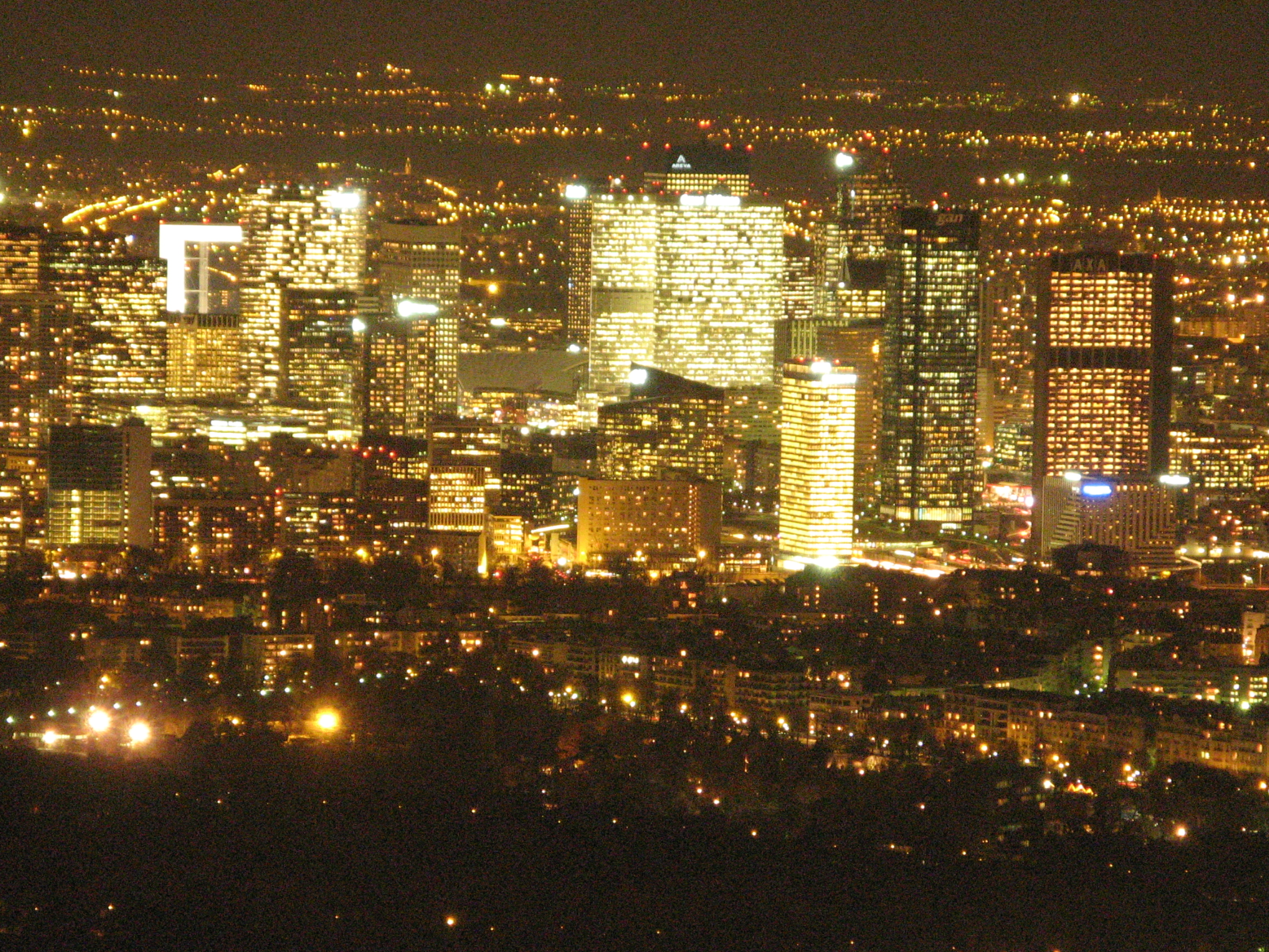 La Défense desde la Torre Eiffel de noche.